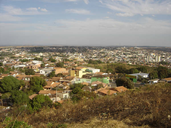 Vista de Catalão a partir do morro de São João, avistando-se o sul.